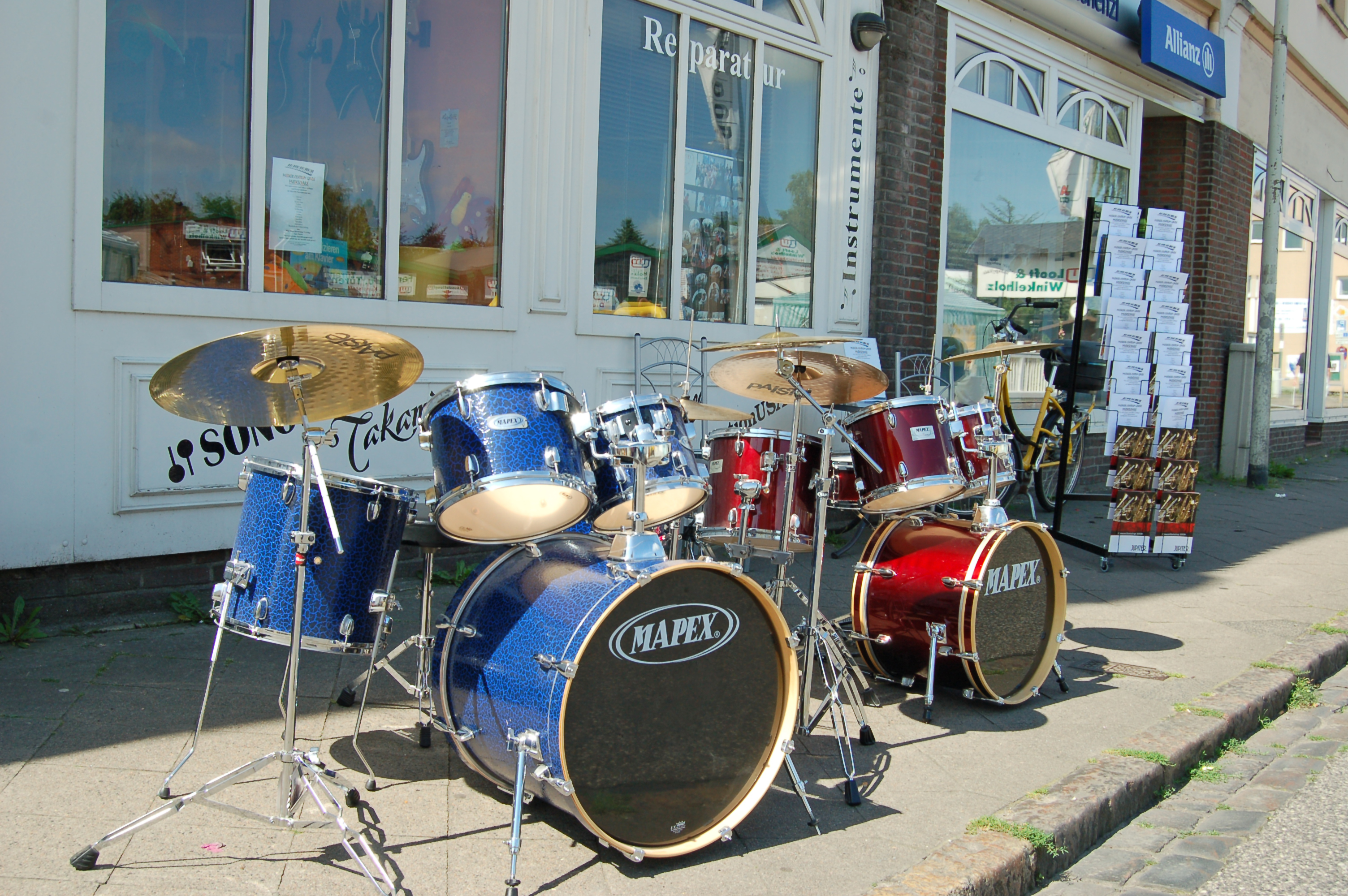 Mapex Drum-kits